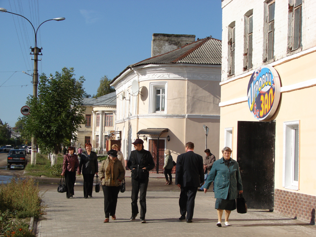 Центр города Судогды